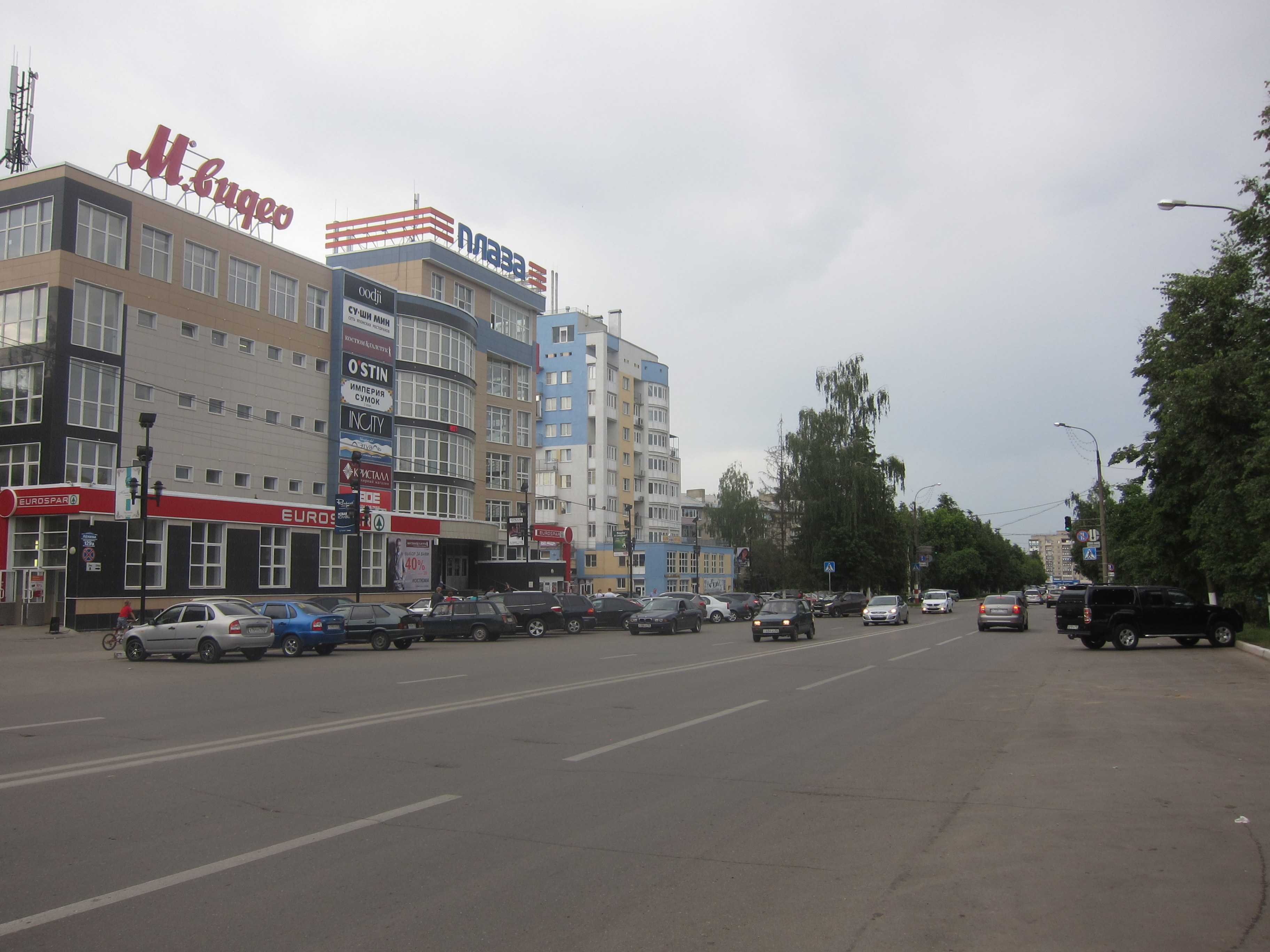 Plaza